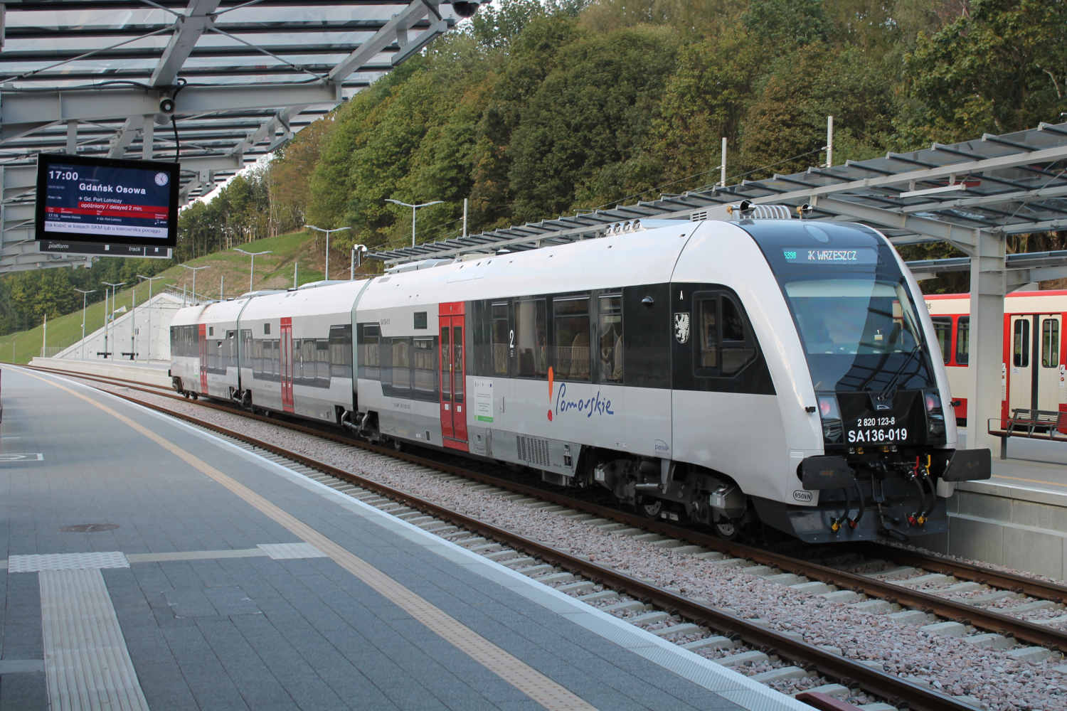 Spalinowy zespół trakcyjny SA136-019 należący do Pomorskiej Kolei Metropolitalnej i eksploatowany przez Szybką Kolej Miejską w Trójmieście stoi na przystanku kolejowym Gdańsk Brętowo. The making of this document was supported by Wikimedia Polska Association, within Wikigrant no. WG 2015-34. English | polski | +/−